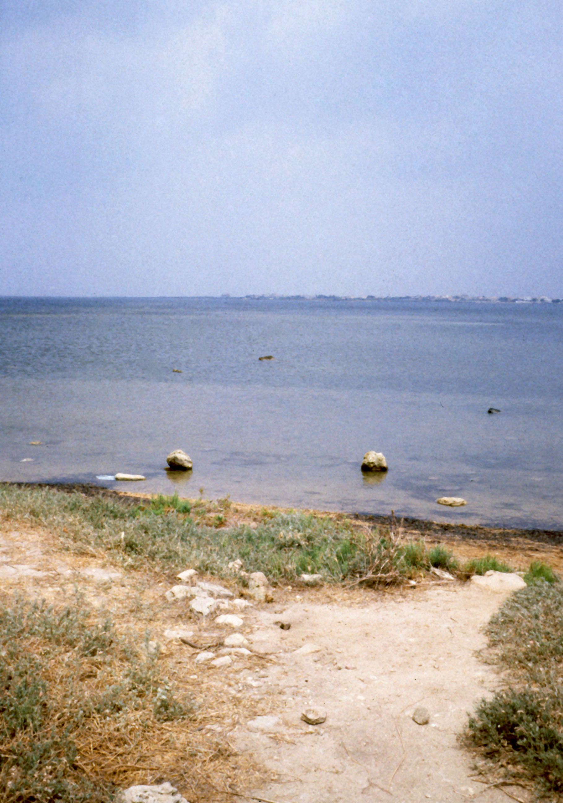 Punto iniziale della strada sottomarina che da Mozia porta alla terraferma; autore Sandro Baldi, Bologna, Italia, estate 1984, fotocamera Konica Autoreflex T